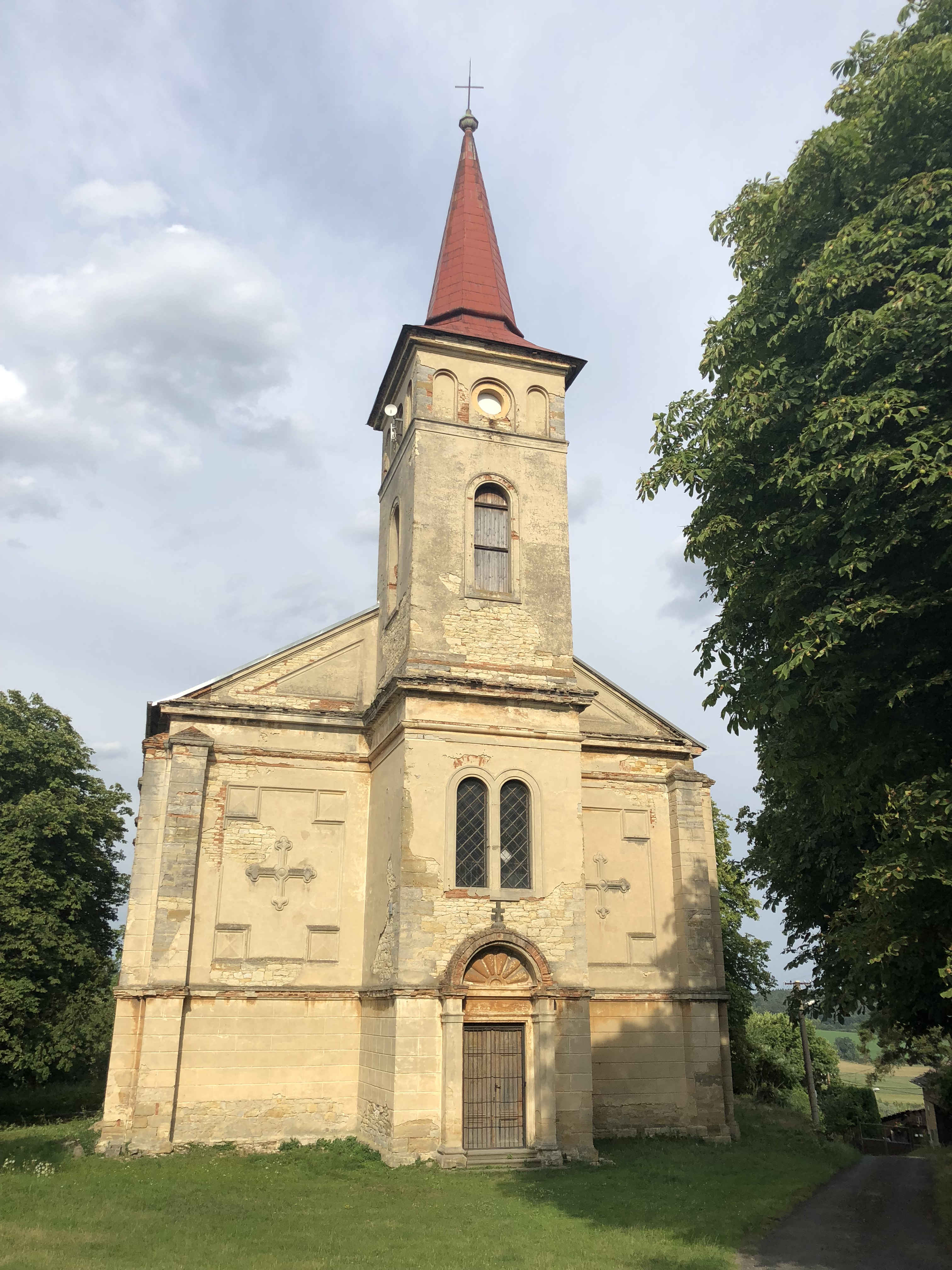 Průčelí kostela sv. Václava ve Strážišti u Drahobuzi